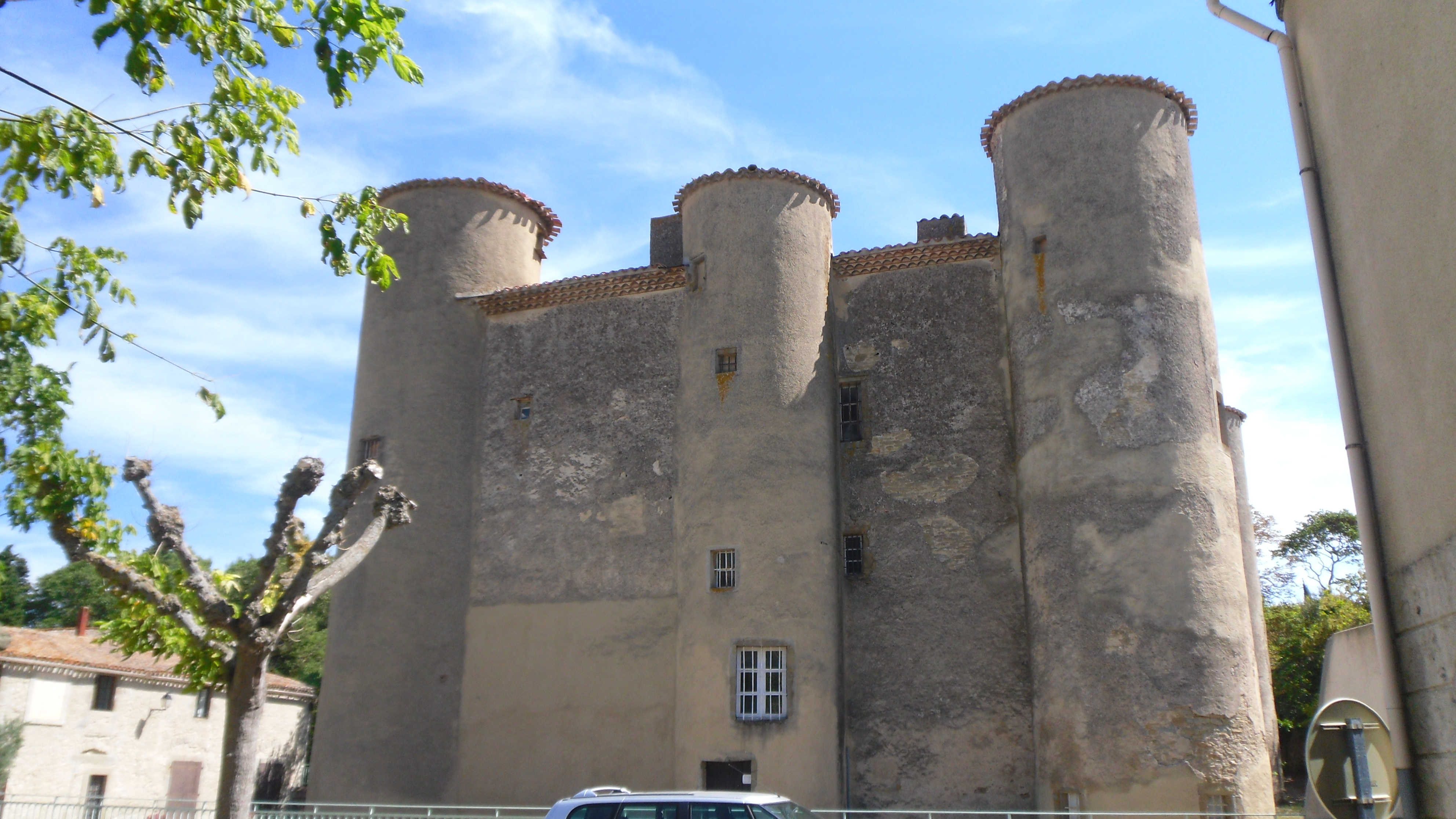 Château deMalves-Minervois